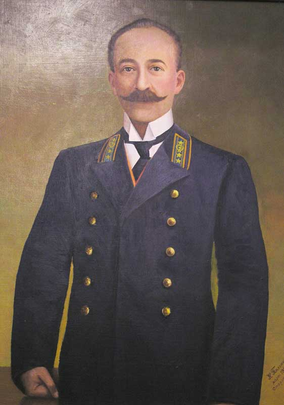 Россия. Павел Павлович фон Дервиз(1870—1943). С 1916 года - Луговой. Фото примерно 1916г.